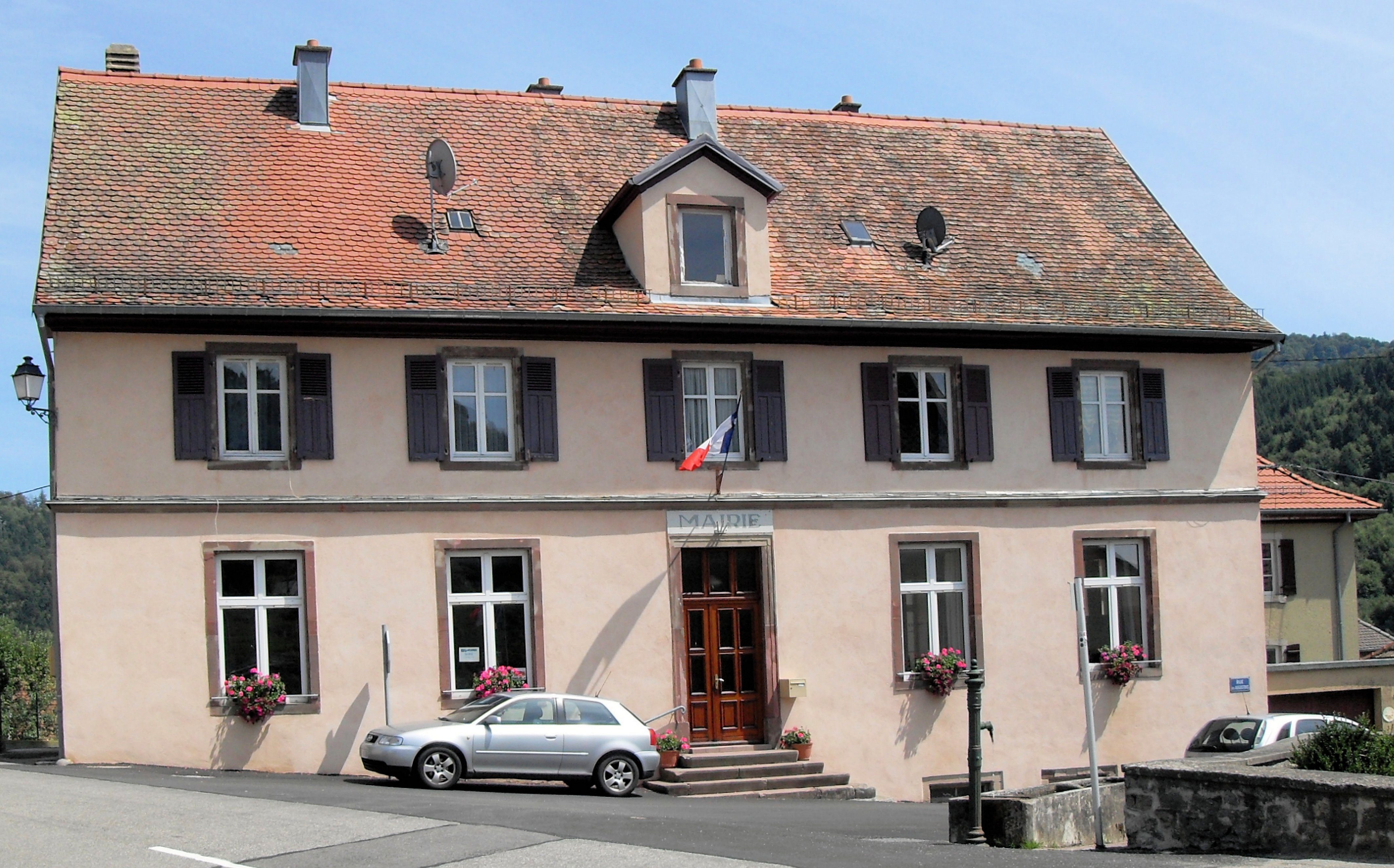 La mairie de Goldbach-Altenbach